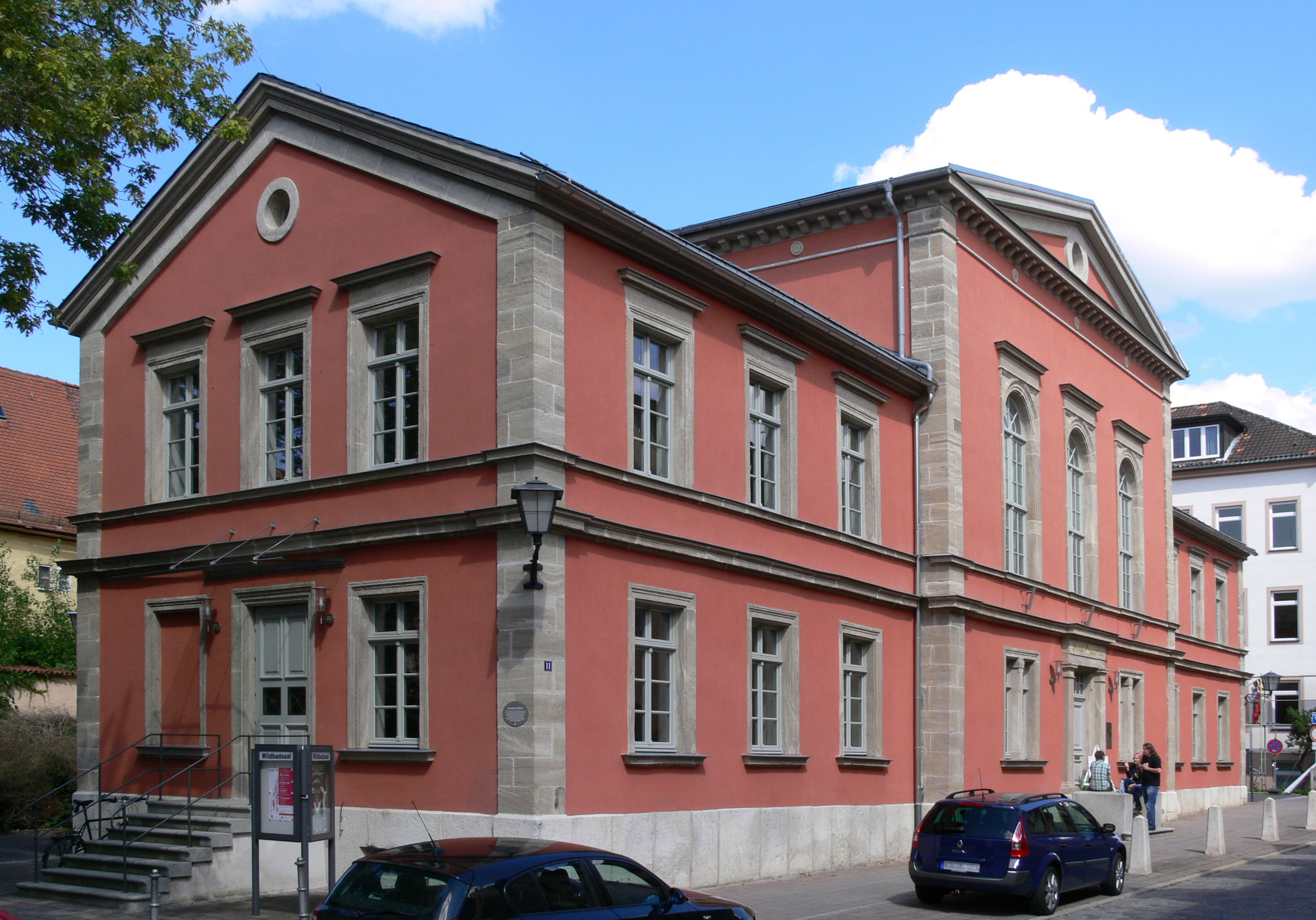 Ehemaliges Wildbad in Weißenburg (Bayern)